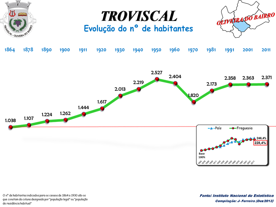 Evolução da População 1864 / 2011